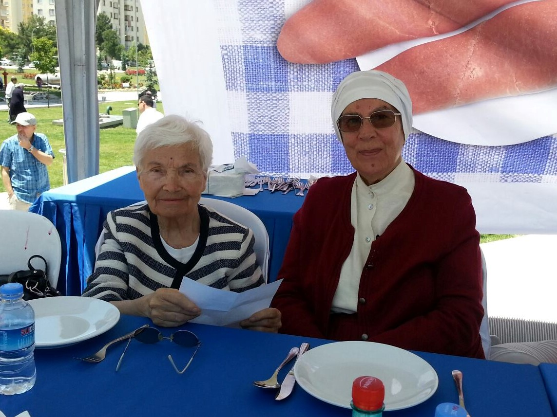 Nevin Halıcı Prof. Dr. Ayşe Baysal ile Konya'da "İsraf Etmiyorum Ekmekten Yemek Yapıyorum" yarışmasında jürilik yaparken (11.06.2013)